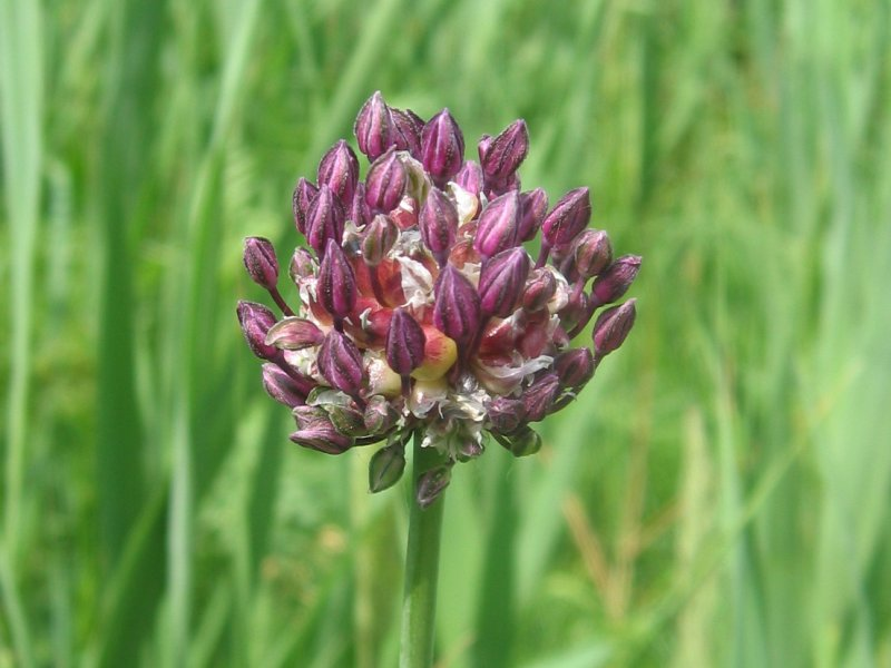 Schlangen-Lauch Allium scorodoprasum, Zingst